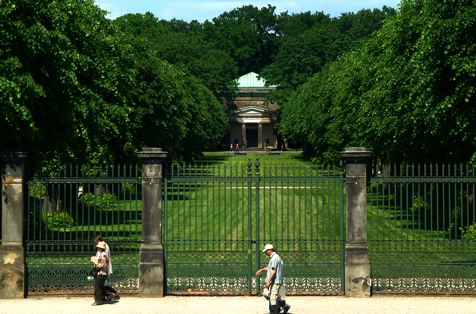 Blick über das Einfahrtsportal durch die Lindenallee von 1726 zum Welfenmausoleum im Berggarten in Hannover; alle drei Teile gehören nach wie vor zum Besitz der Welfenfamilie.